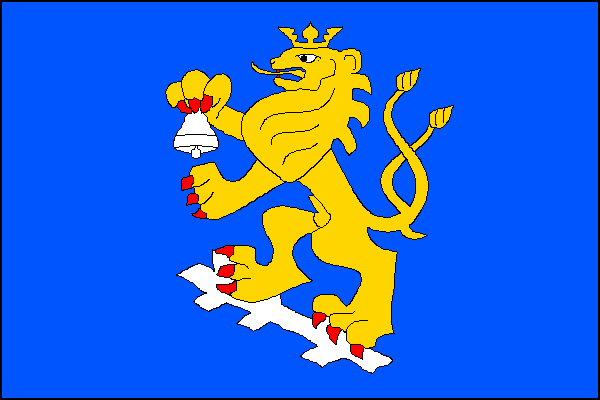 vlajka,Vítonice , okres Znojmo